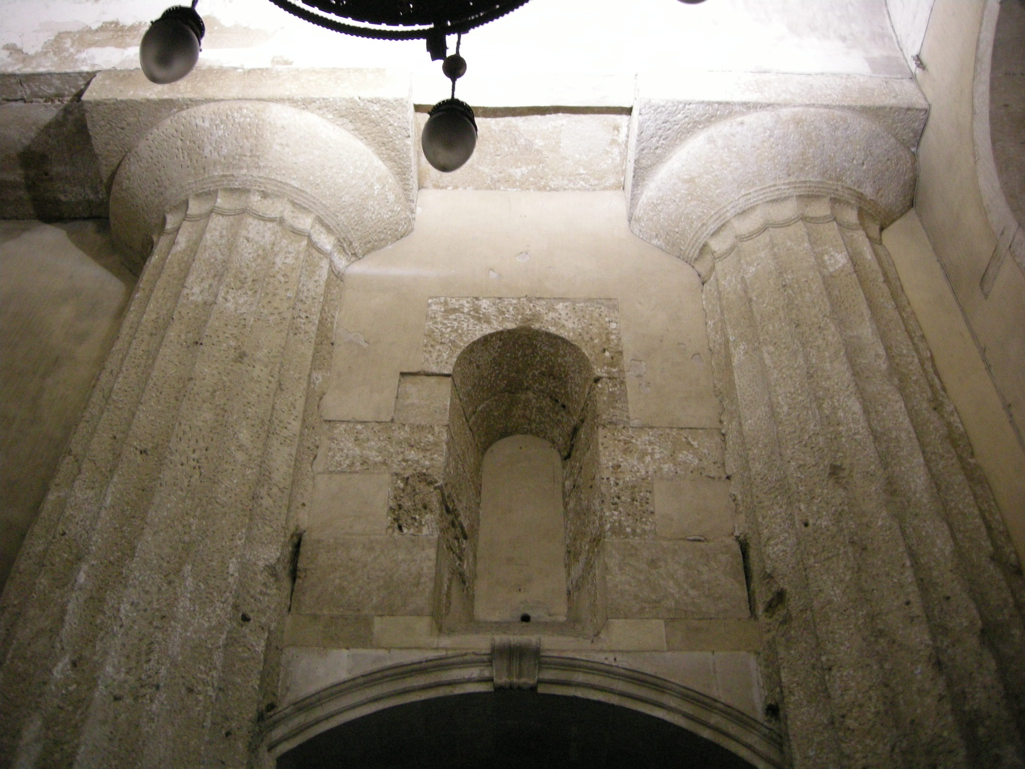 Ortigia, duomo, interno